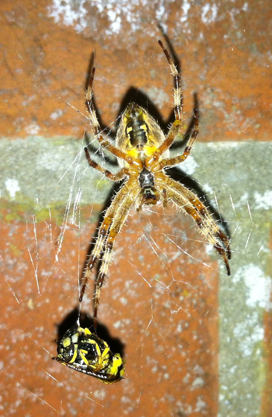 Eine Kreuzspinne mit eingewickelter Beute an ihrem Netz an einer Hauswand.